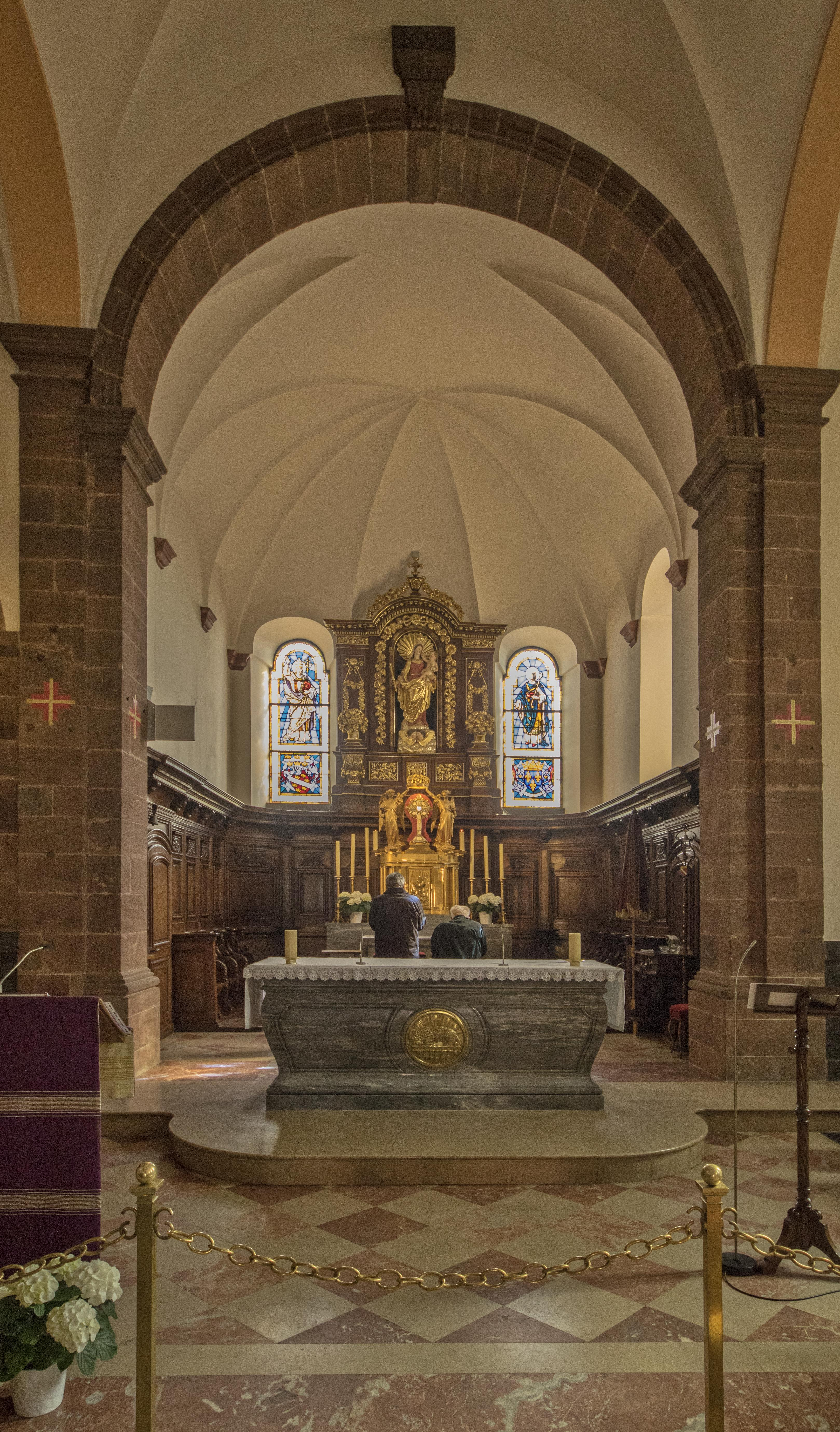 Bilder vom Le Mont ste. Odile (Odilienberg im Elsaß) Blick in die Kirche der Chor